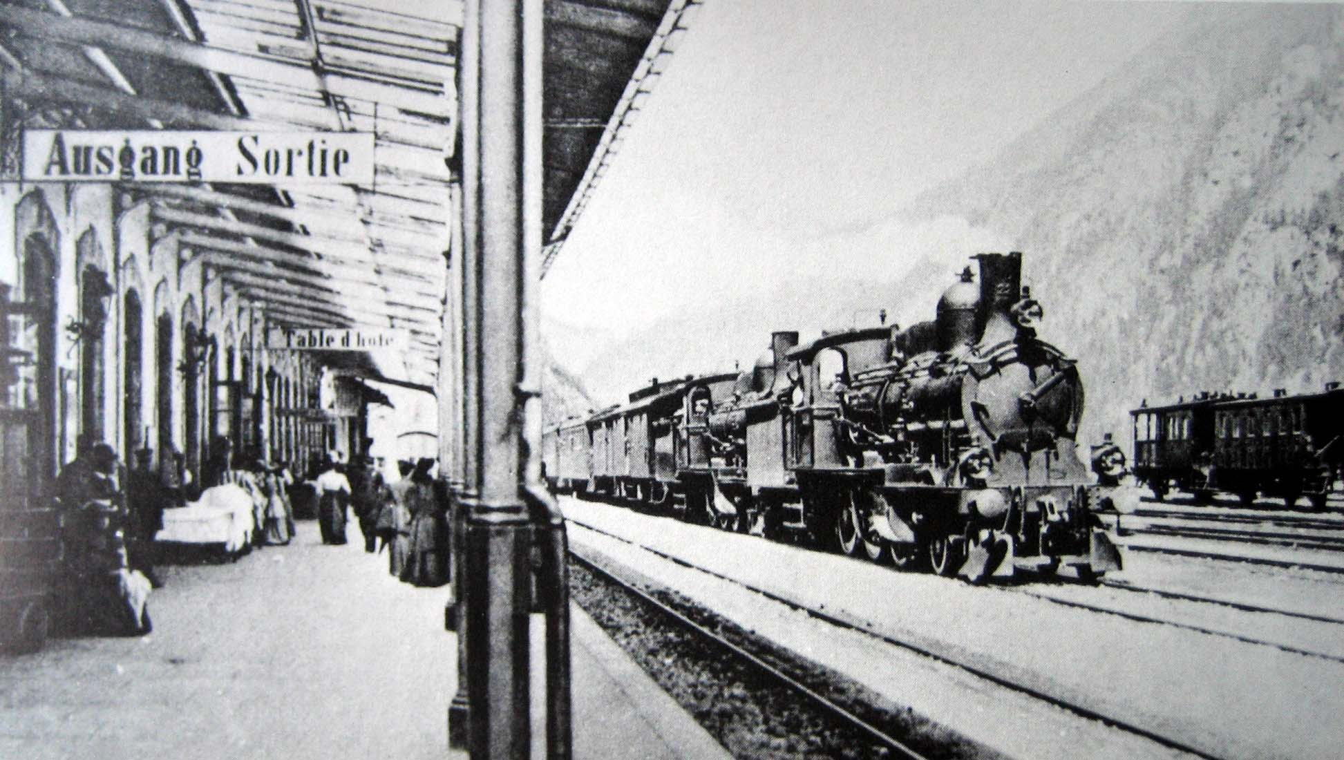 Dampfzug in Göschenen